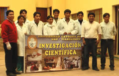 Investigación Cientifica en las Unidades Academicas Campesinas UCB